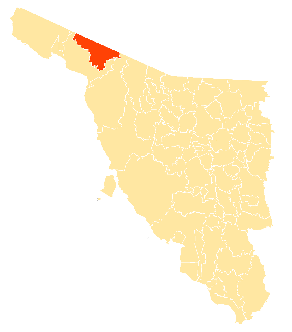 Municipio dentro de Sonora, México.